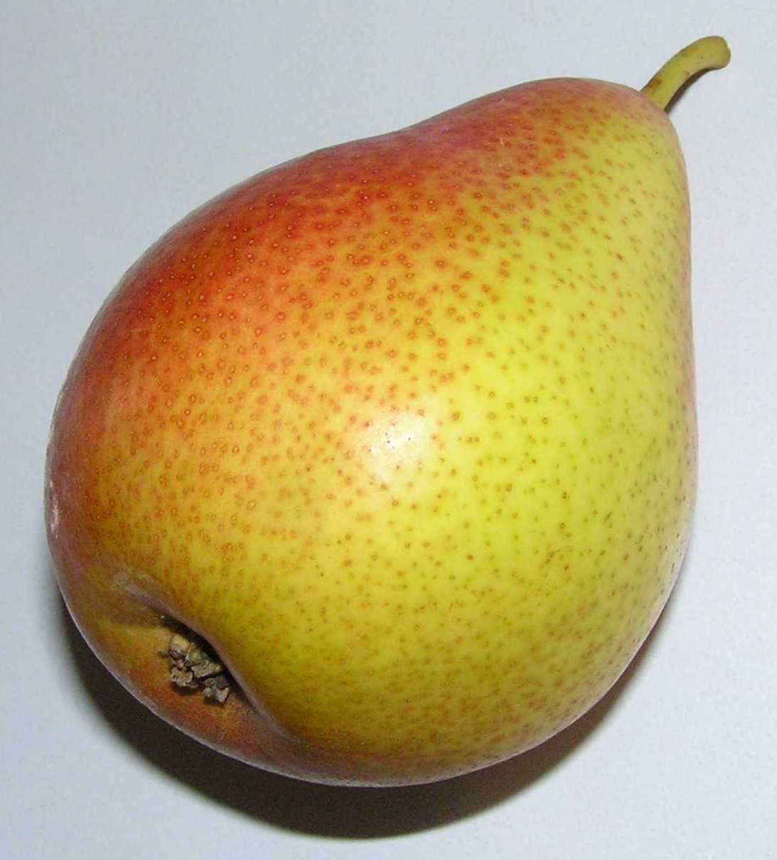 Eine reife Forellenbirne von schräg unten